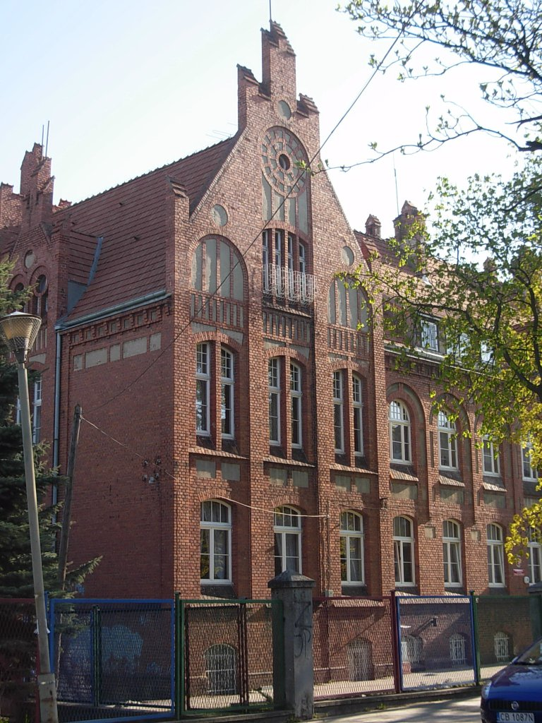 Bydgoski Zespół Placówek Opiekuńczo-Wychowawczych, ul. Traugutta 5 (1905-07, Carl Meyer), dawniej sierociniec miejski fundacji Hermanna Dietza